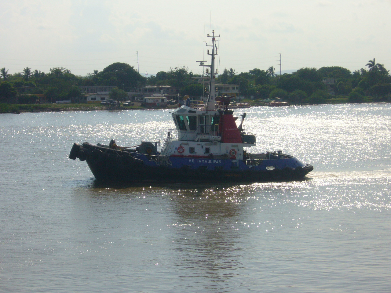 El V.B. Tamaulipas navegando por el Río Pánuco en la ciudad de Tampico, Tamaulipas, México.